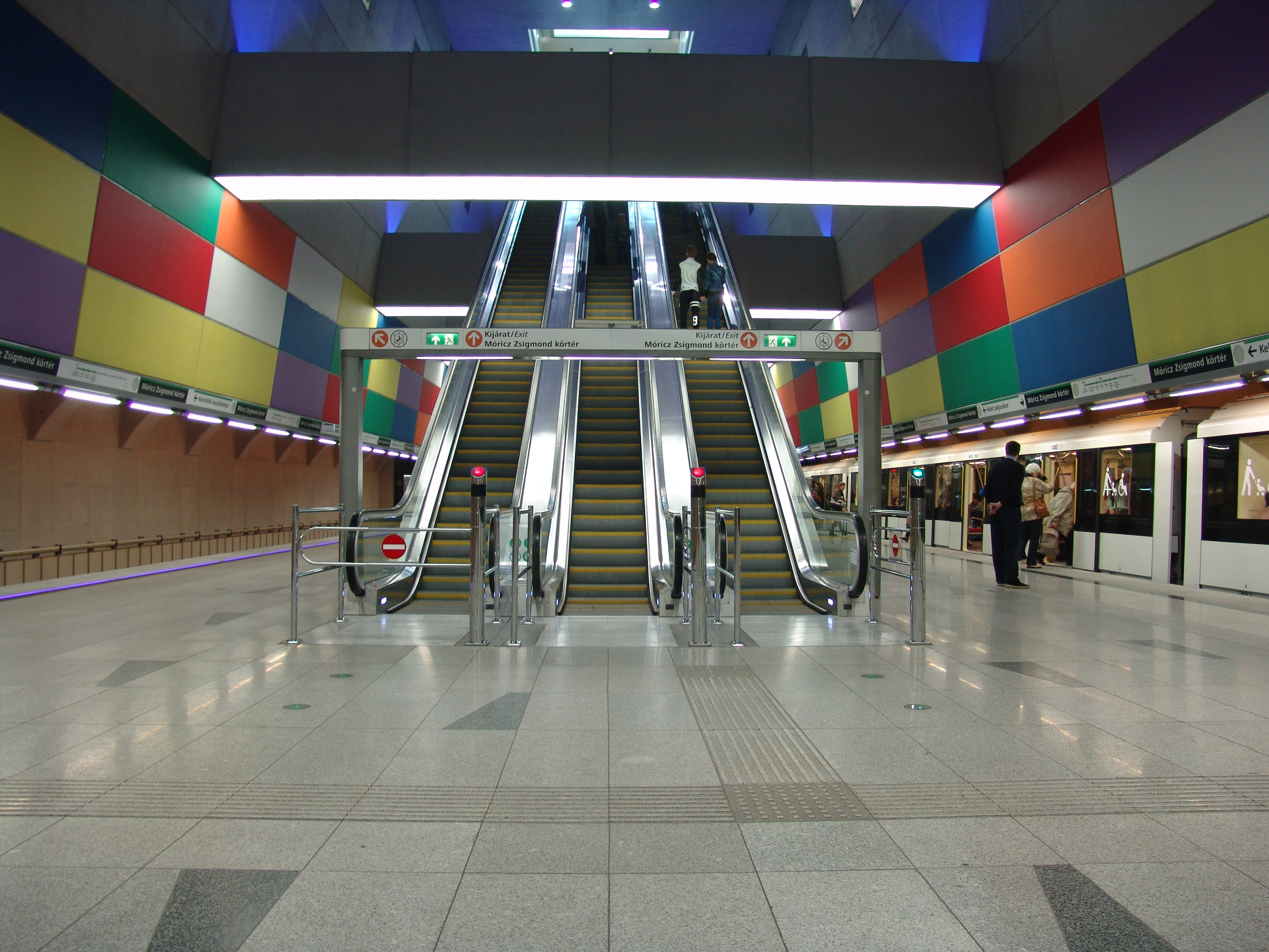 A budapesti 4-es metró Móricz Zsigmond körtér állomása